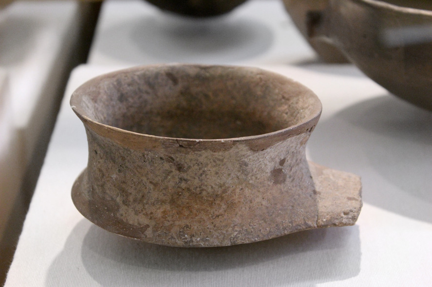 Es tracta d'un vas carenat geminat de l'Edat del Bronze descobert en 1935 i depositat al Museu de Prehistòria de València. Es troba exposat a la sala permanent "L'inici de la metal·lúrgia" del Museu de Prehistòria de València.